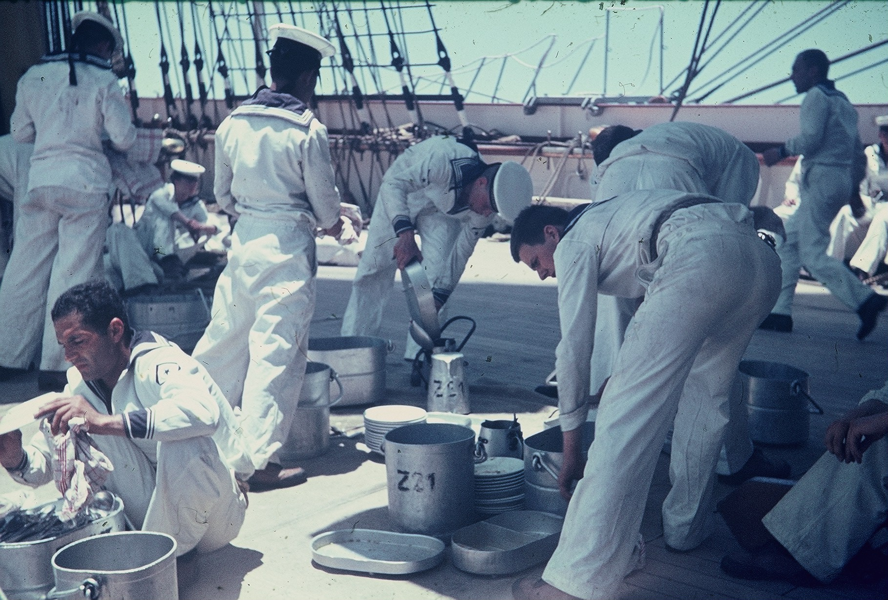 Abwasch an Oberdeck der Gorch Fock (1958)